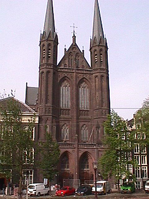 Catholic church De Kijtberg in Amsterdam